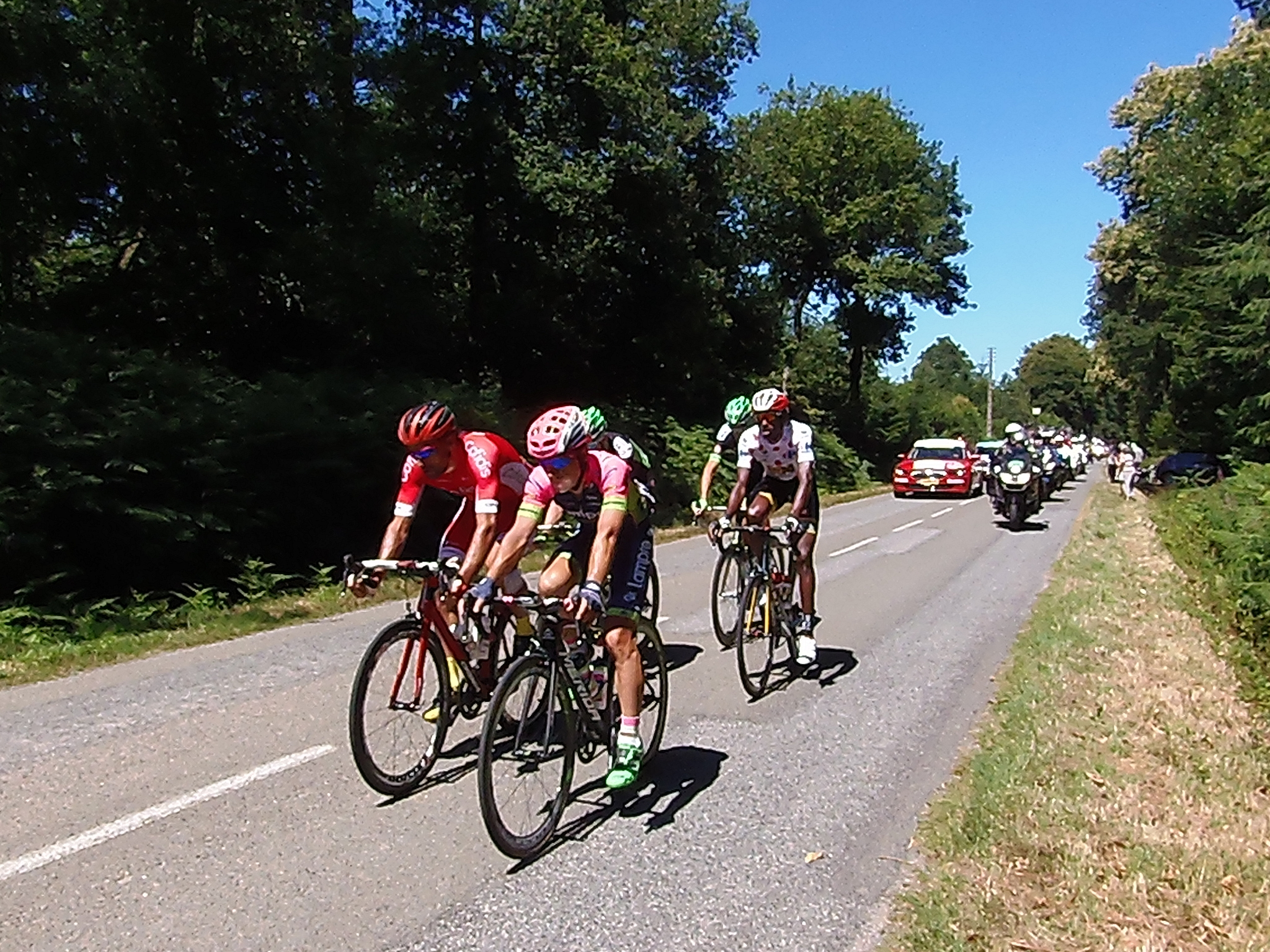 7e étape du Tour de France 2015, en limite de Lignières-Orgères et Saint-Calais-du-Désert (km 104, Pays de la Loire, France). Les cinq échappés : Luis Ángel Maté, Kristijan Đurasek, Anthony Delaplace, Brice Feillu et Daniel Teklehaimanot (maillot à pois).